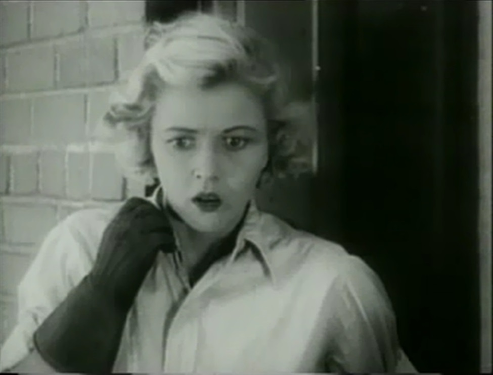 Imagen de la actriz estadounidense Cecilia Parker en una escena de la película Jinetes del destino.